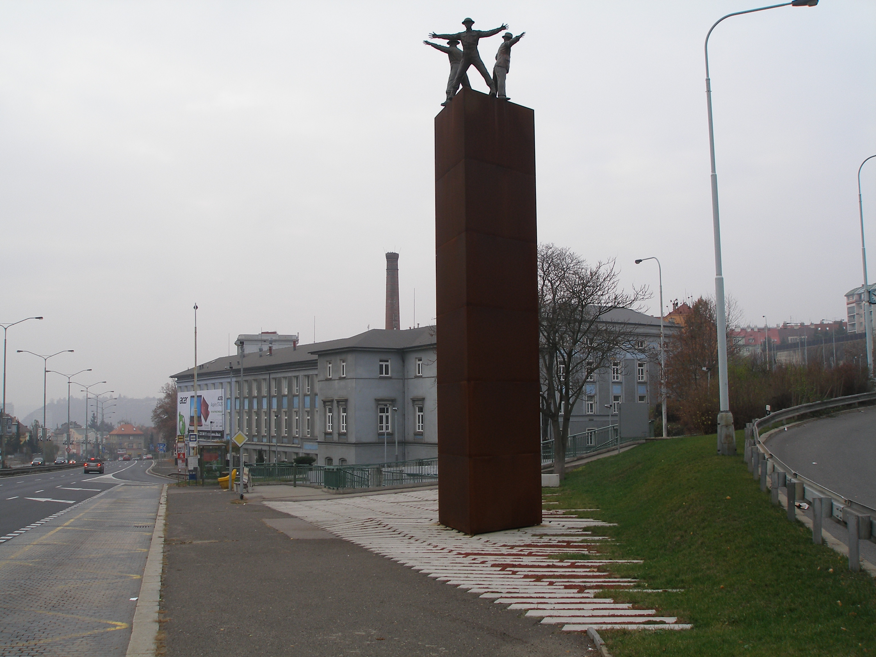 Památník Operace Anthropoid na pražské Vychovatelně.